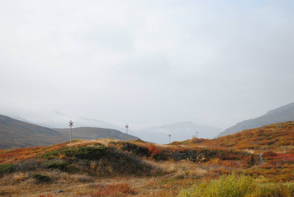 Vandringsled i Abisko, påväg mot Kårsavagge